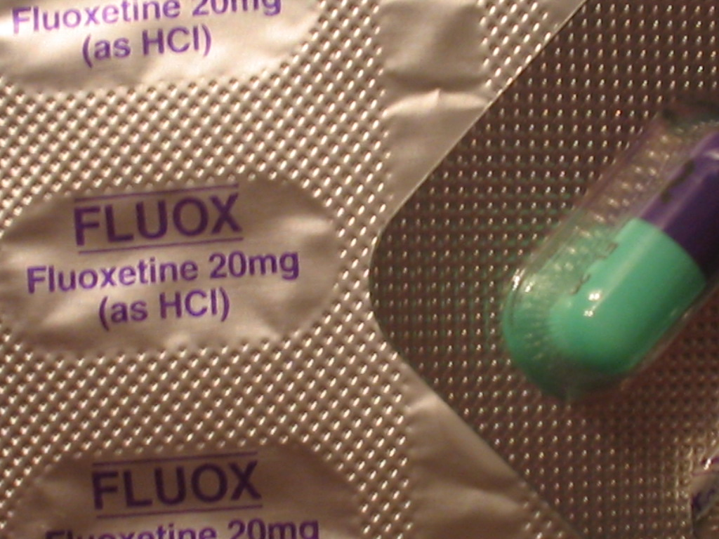 Fluoxetine